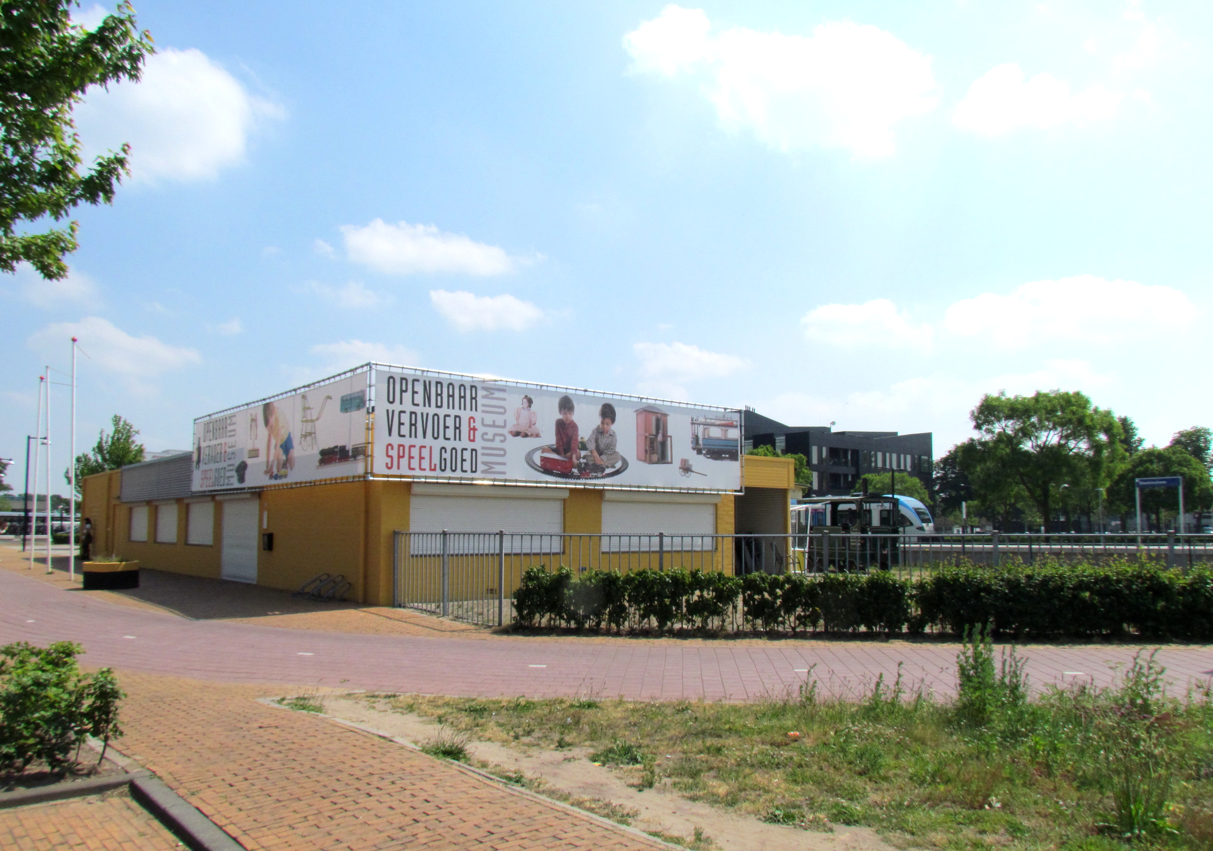 Het Openbaar Vervoer & Speelgoed Museum naast station Doetinchem (NL)